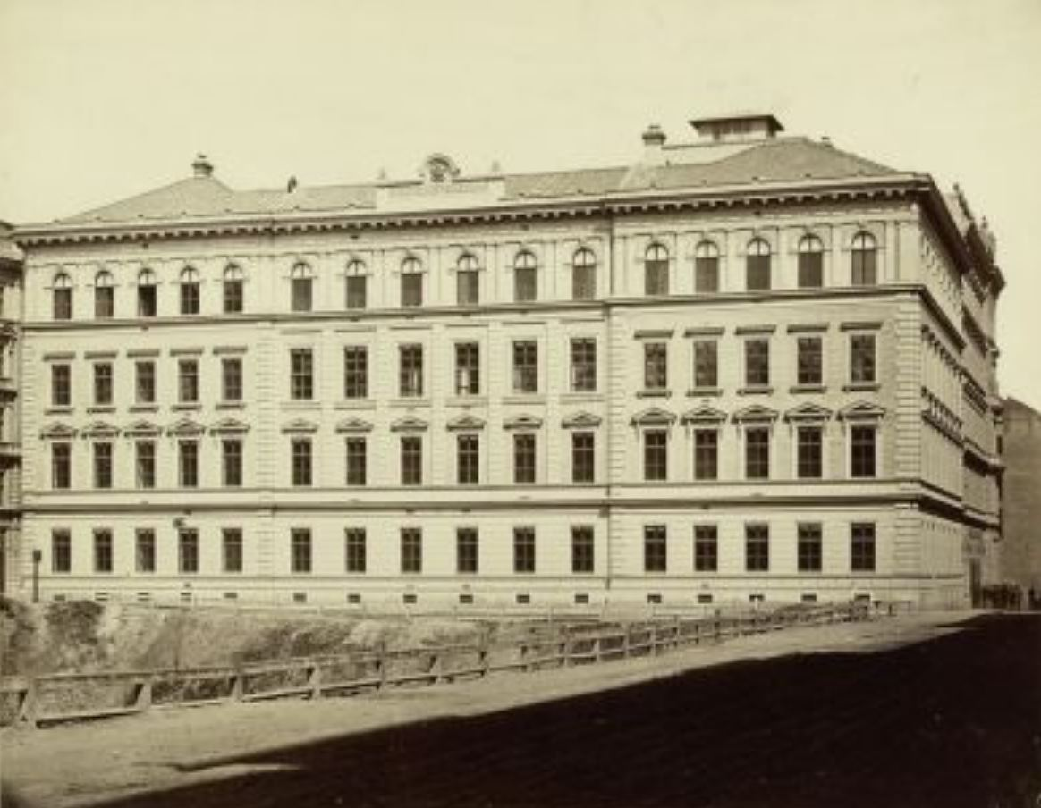 Pädagogikum Fichtengasse 3 Wien, Österreich, um 1870